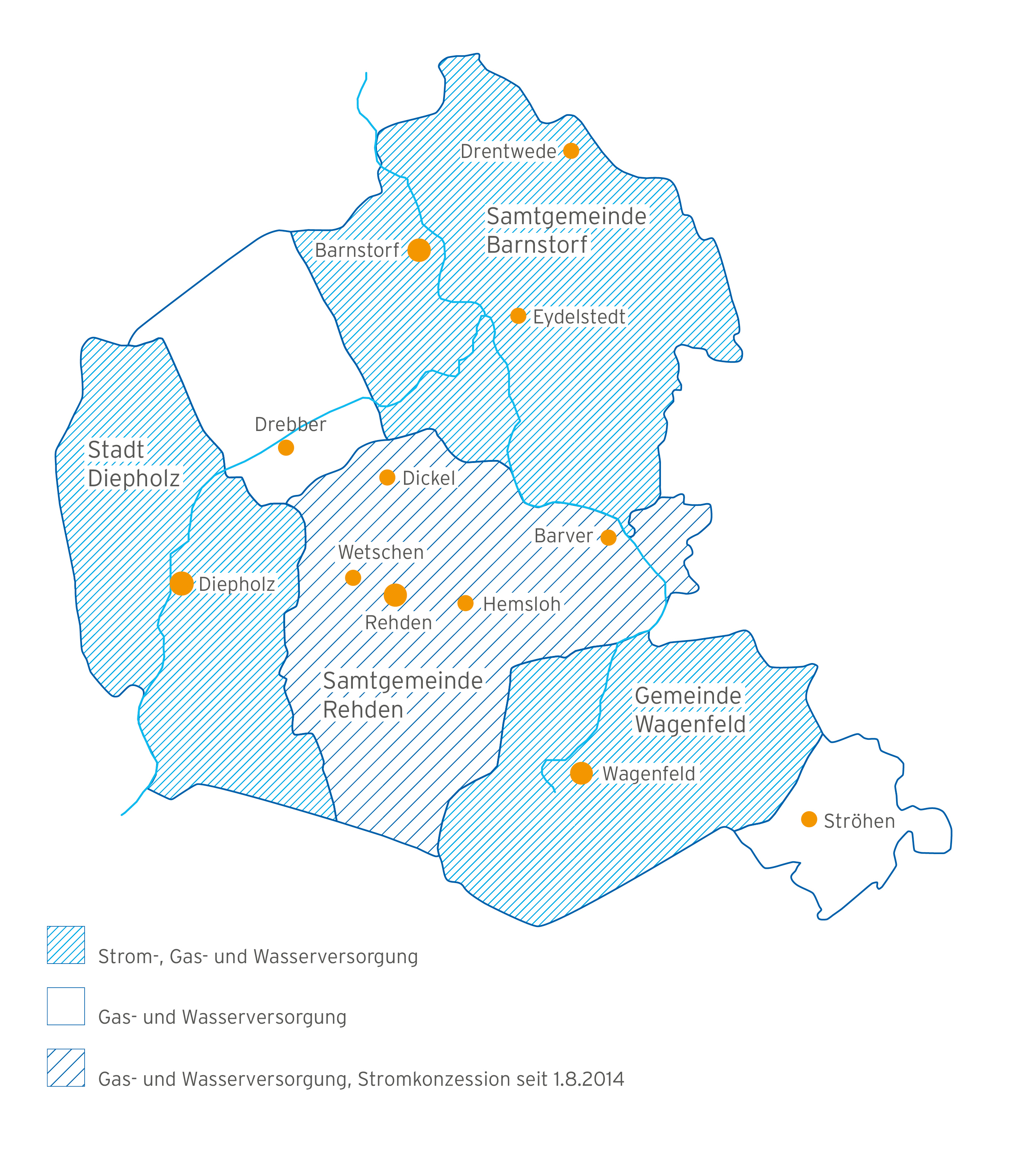 Netzgebietskarte der Stadtwerke Huntetal, Stand 11/2019